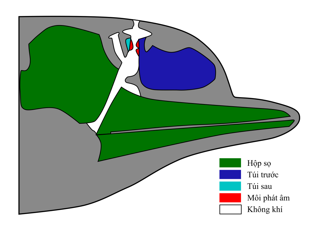 Bản chất việc cá voi phát ra âm thanh